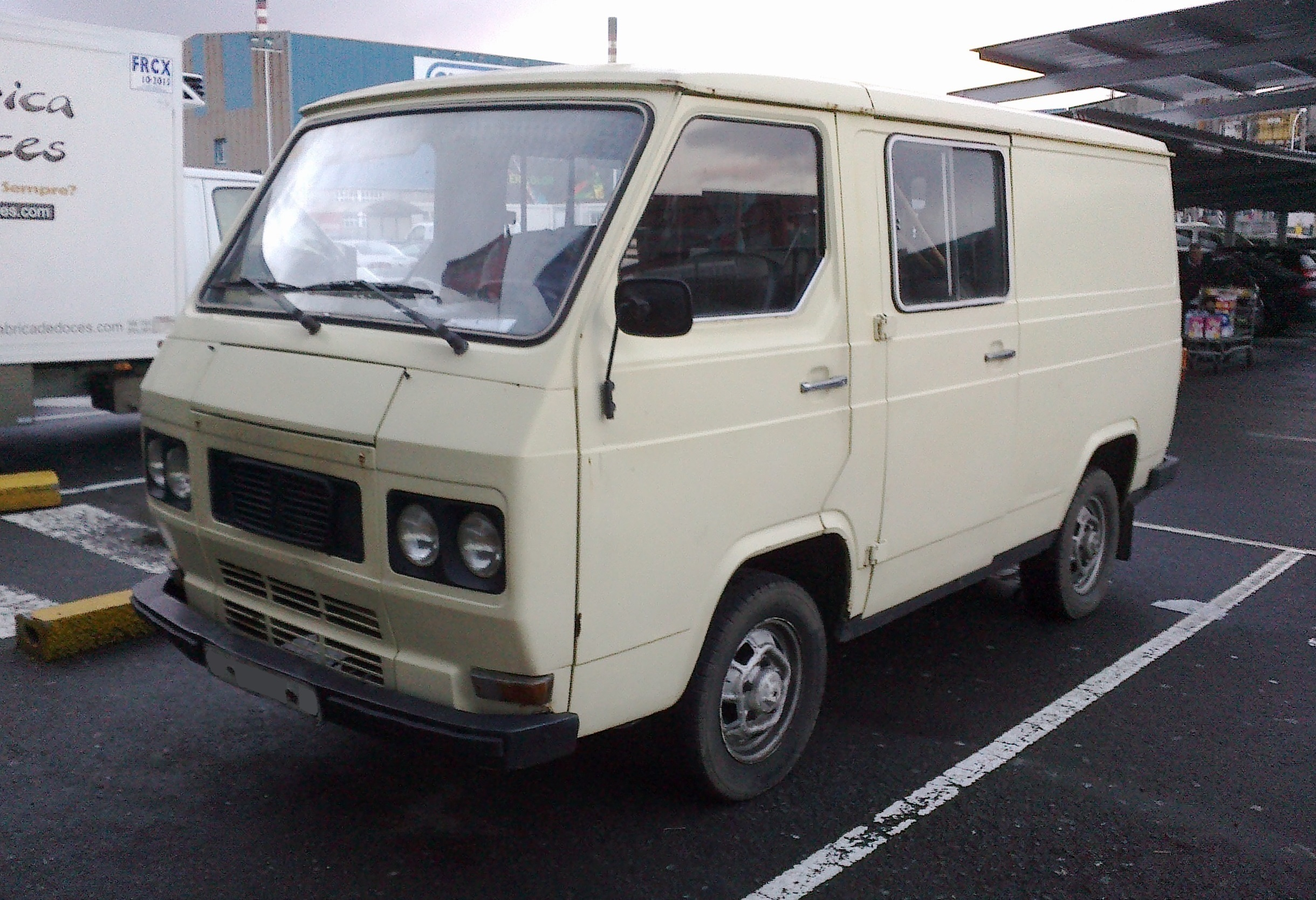 Furgoneta Avia de 1981. Este modelo, diseñado por AISA (Aeronáutica Industrial, S. A.), se vendía con los nombres 1000, 1250 y 2000. La carrocería era idéntica a la de las Ebro F260, F275 y F350. Tanto las Avia como las Ebro fueron producidas por Nissan entre 1987 y 2001 con el nombre Trade.